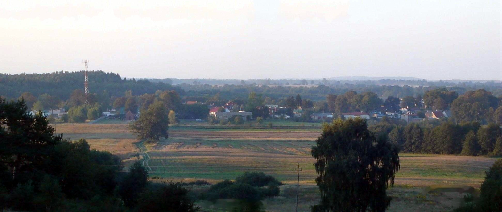 Redło - widok z Redłowskich Gór